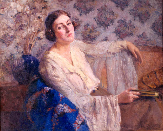 . زيت على توال. بعد المطالعة. و يصفها النقاد بلوحة الراهبة. او موناليزا مصر